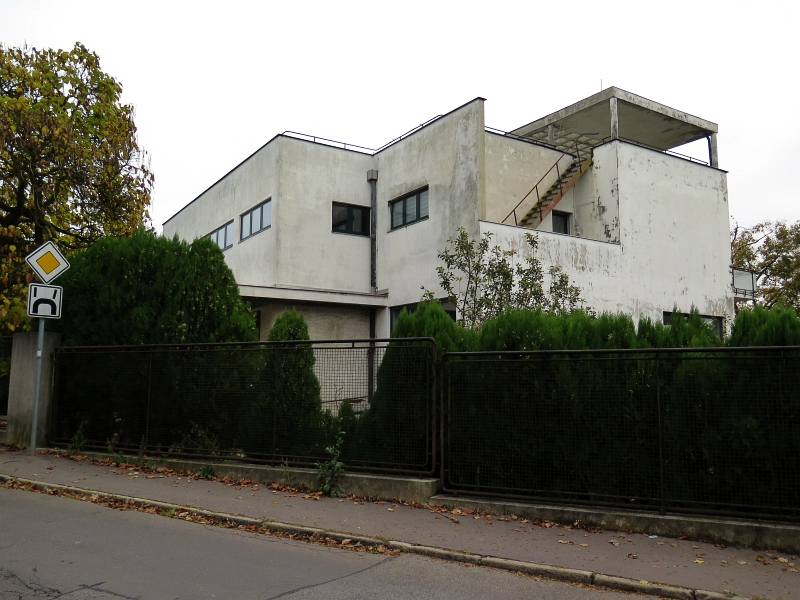 Vila Barrandovská 60, Barrandovská 335/60, Barrandov.